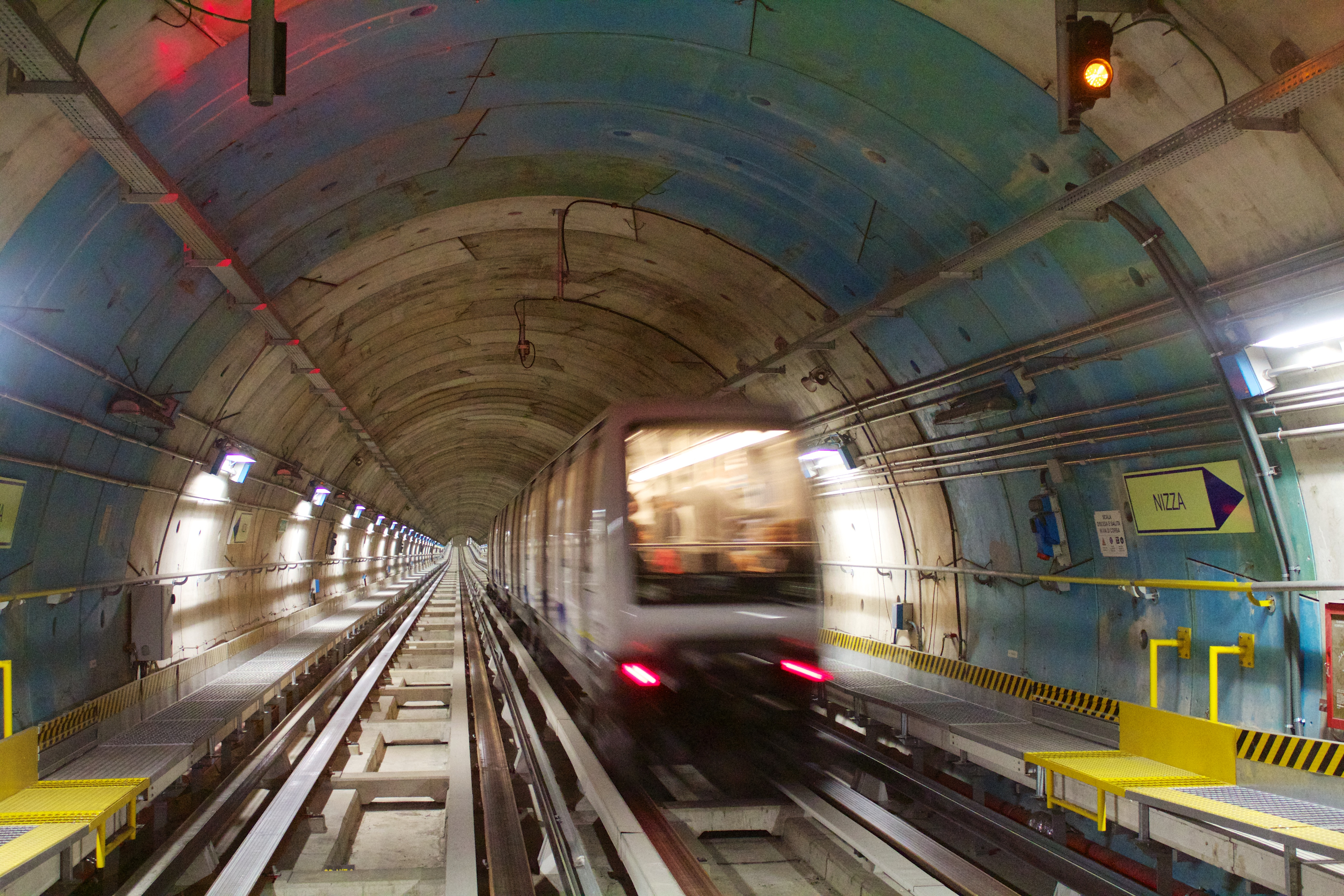 Metropolitana di Torino